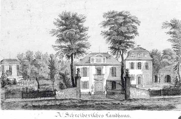 Schreiberisches Landhaus. Nebenansicht von Heilbronn und seine Umgebungen